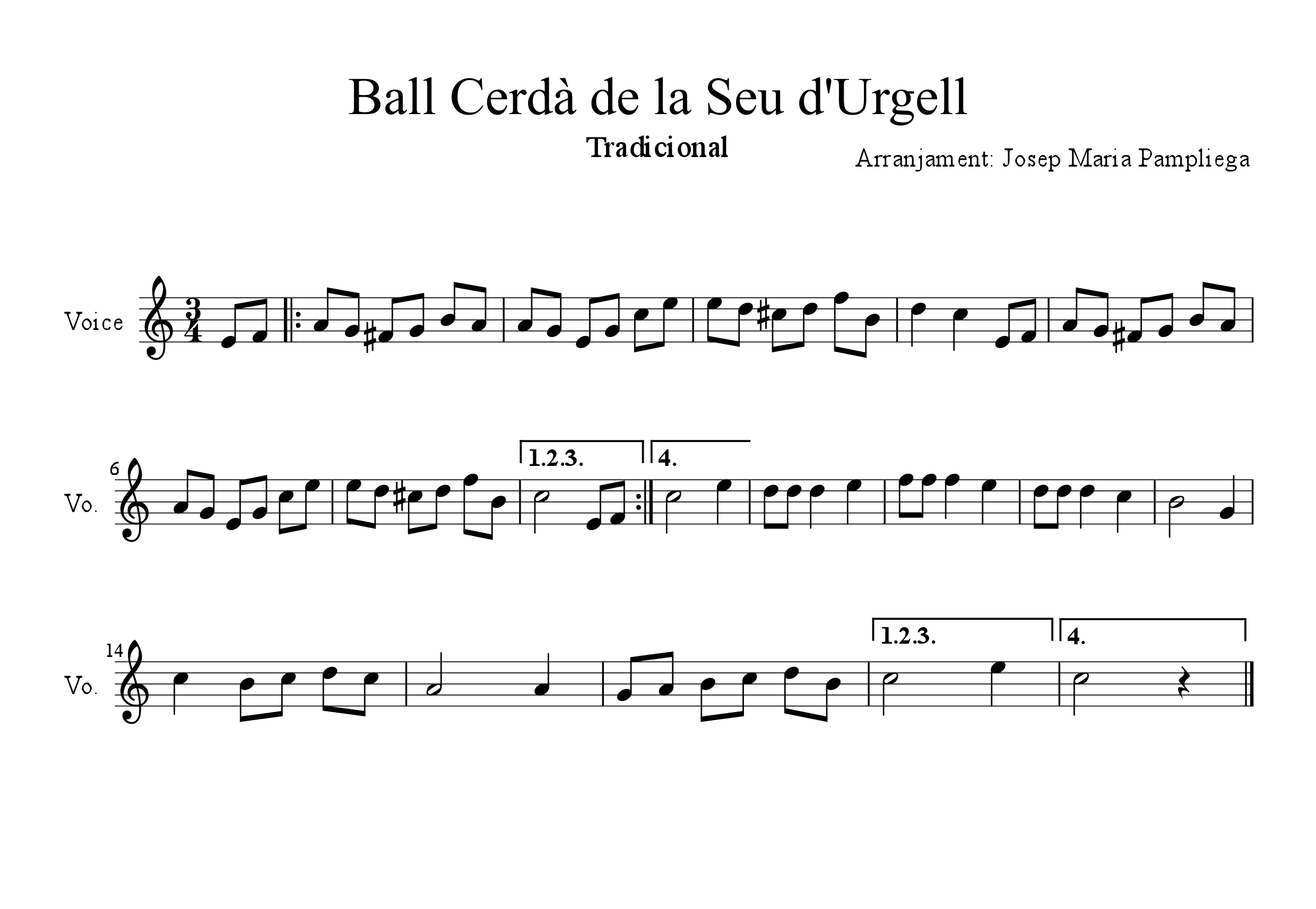 Partitura del Ball Cerdà de la Seu d'Urgell.